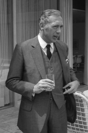 Bundeskanzler Willy Brandt empfängt Filmschauspieler Information added by Wikimedia users.